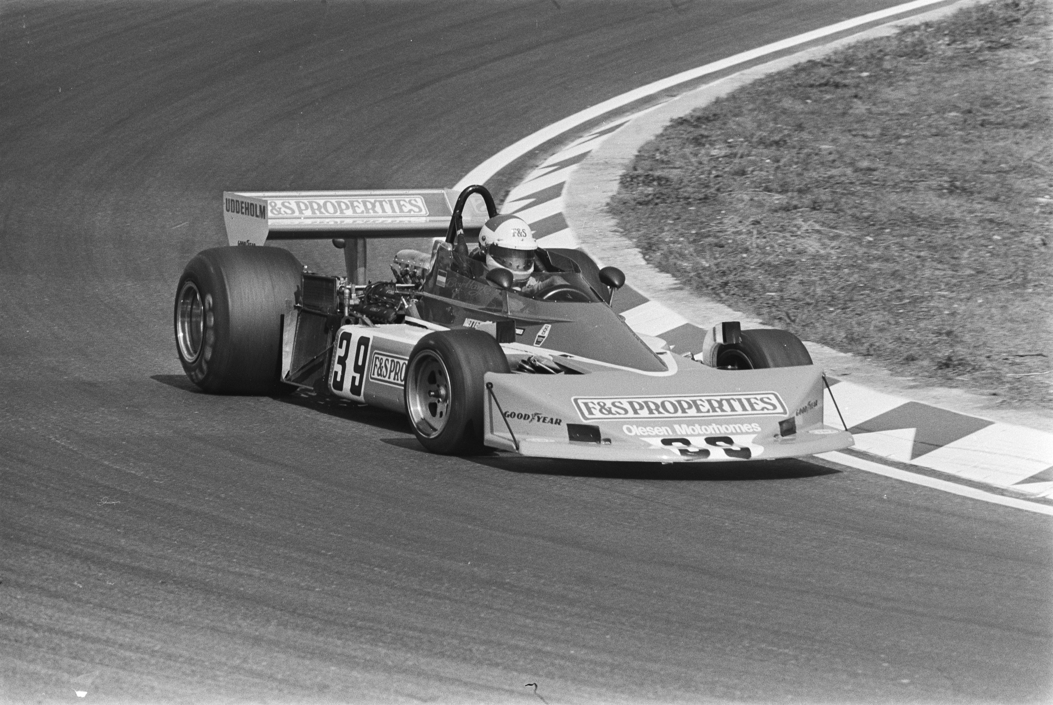 Training Grand Prix op Zandvoort; Boy Haye in Ford acht cilinder van Penske.